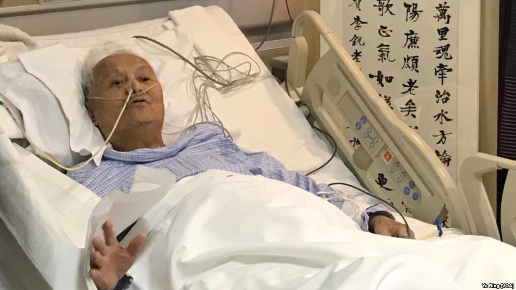 2018年4月13日，中共党史专家李锐在医院病房庆祝101岁生日。（美国之音叶兵拍摄）